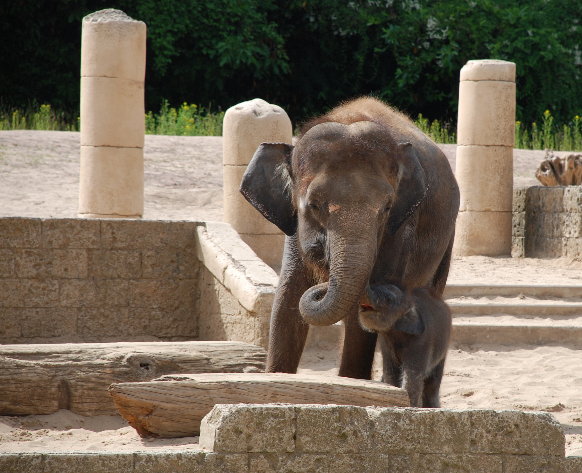 Elefanten im Dschungelpalast des Zoo Hannover 2010